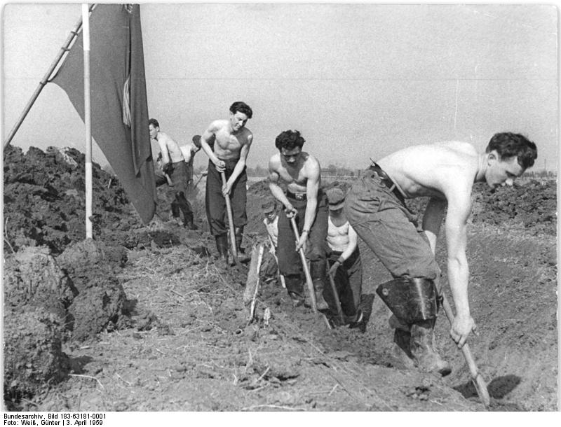 Wahrenberg, Anlegen eines Entwässerungsgrabens Zentralbild Weiß 3.4.1959 Magdeburg Altmärkische Wische - Bauplatz der Jugend UBz: FDJ-Mitglieder aus dem Kreis Salzwedel heben in Wahrenberg, Kreis Seehausen, einen Graben aus.